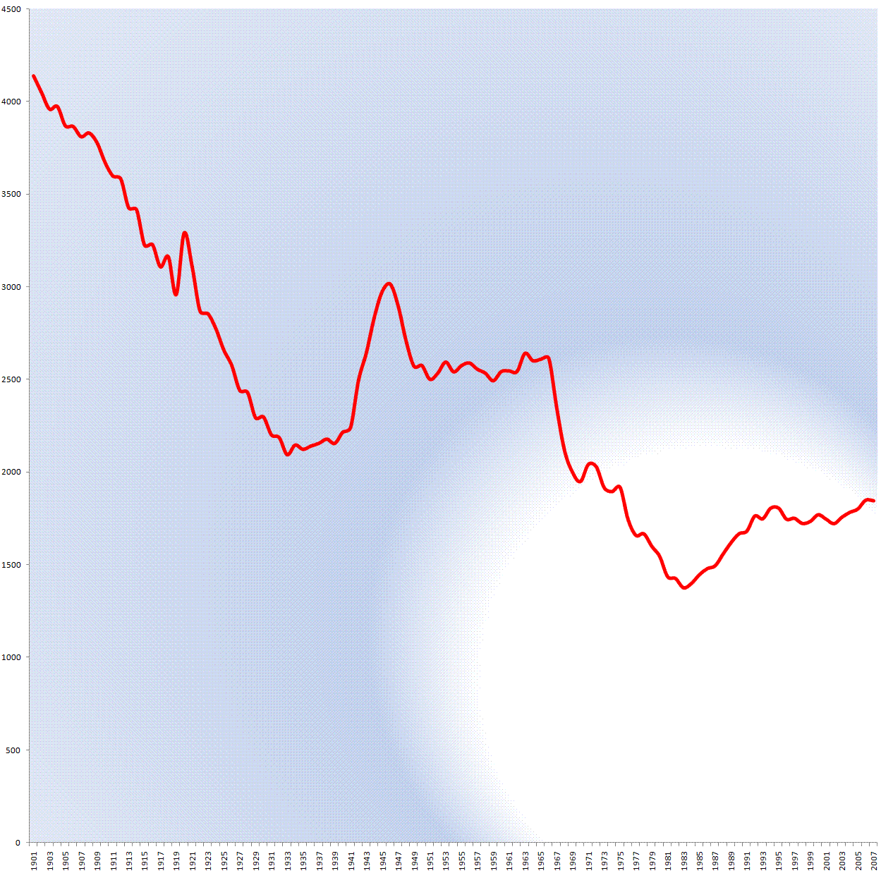 Total fertilitetskvotient. Baseret på data fra Dansk Statistik.